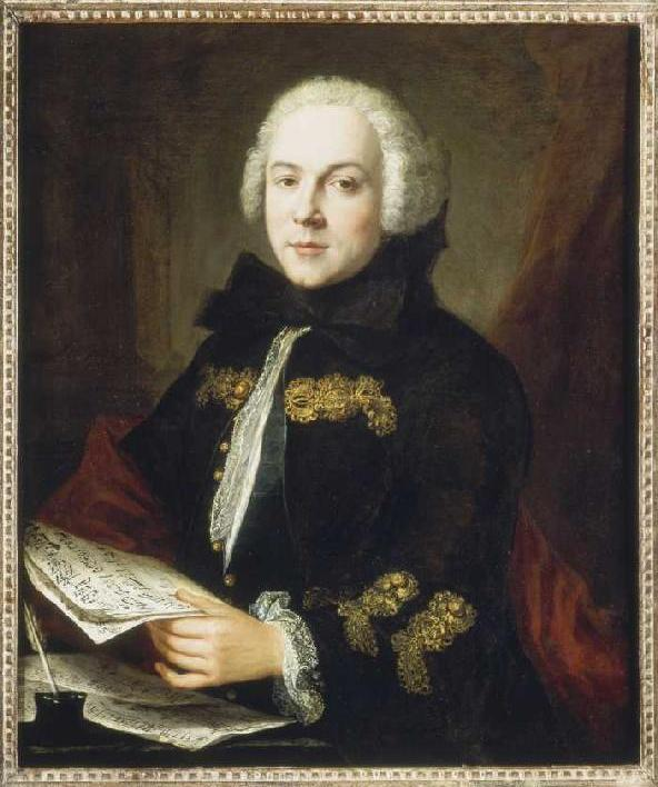 Portrait de Boccherini attribué à Jean-Etienne Liotard (1702-1789).